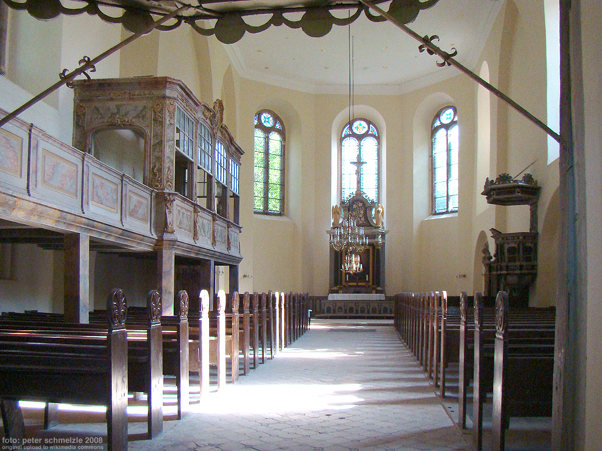 Schlosskirche Ivenack, Blick zum Altar